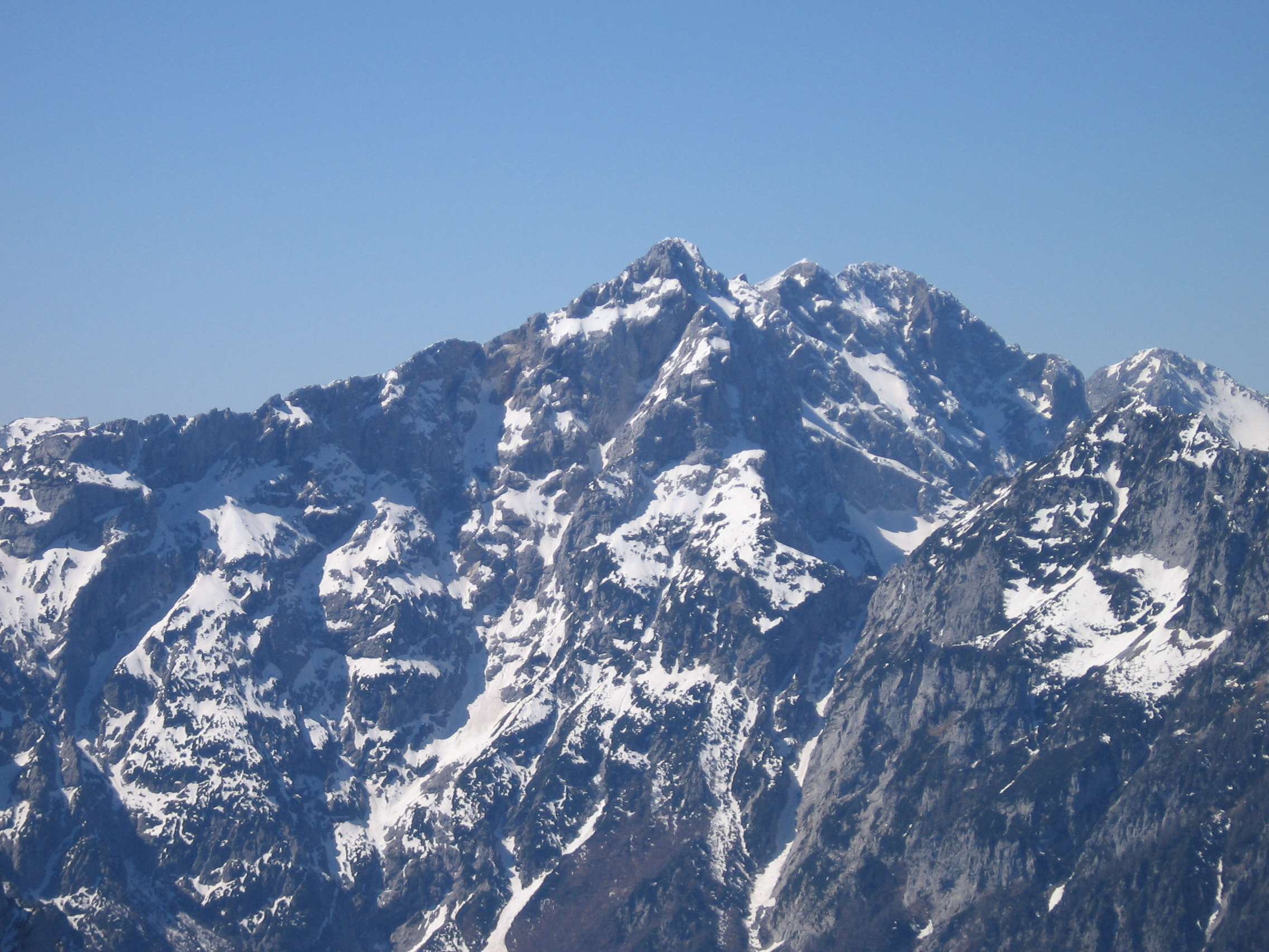 Mt. Ojstrica in Kamnik Alps, from Raduha